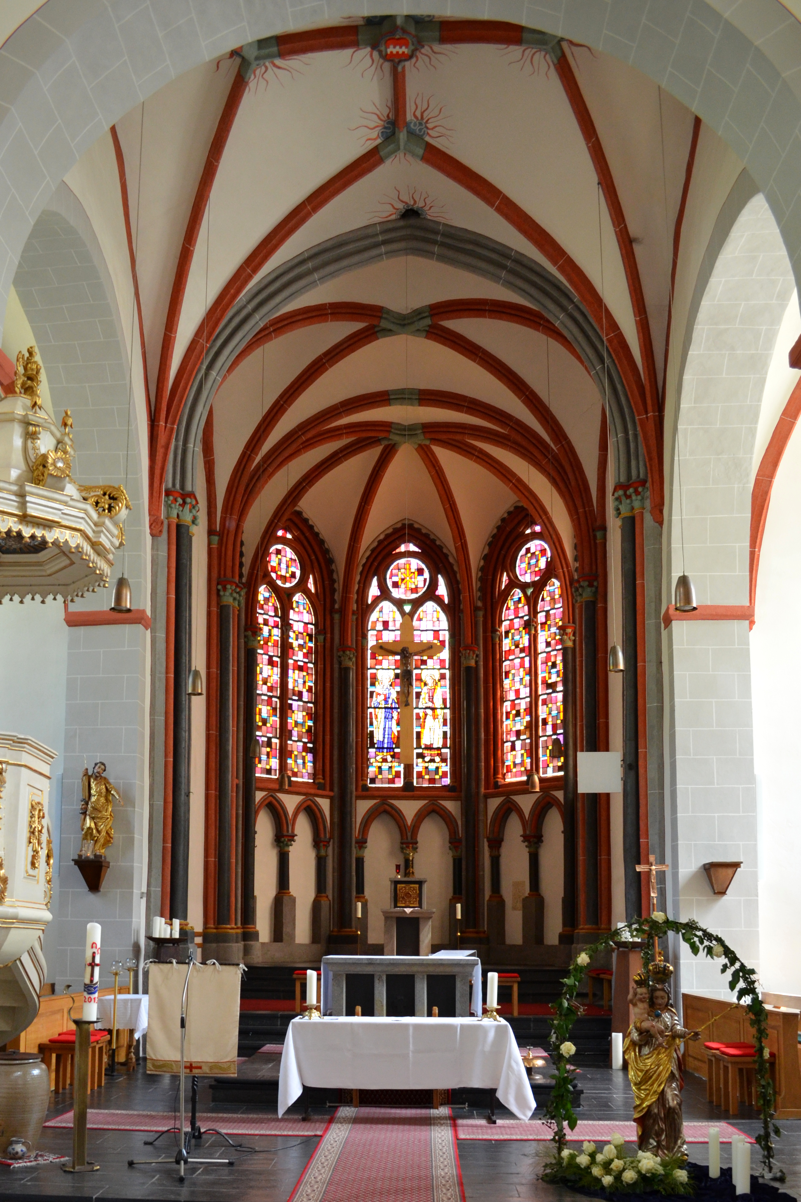 Boppard-Hirzenach Bartholomeüskerk